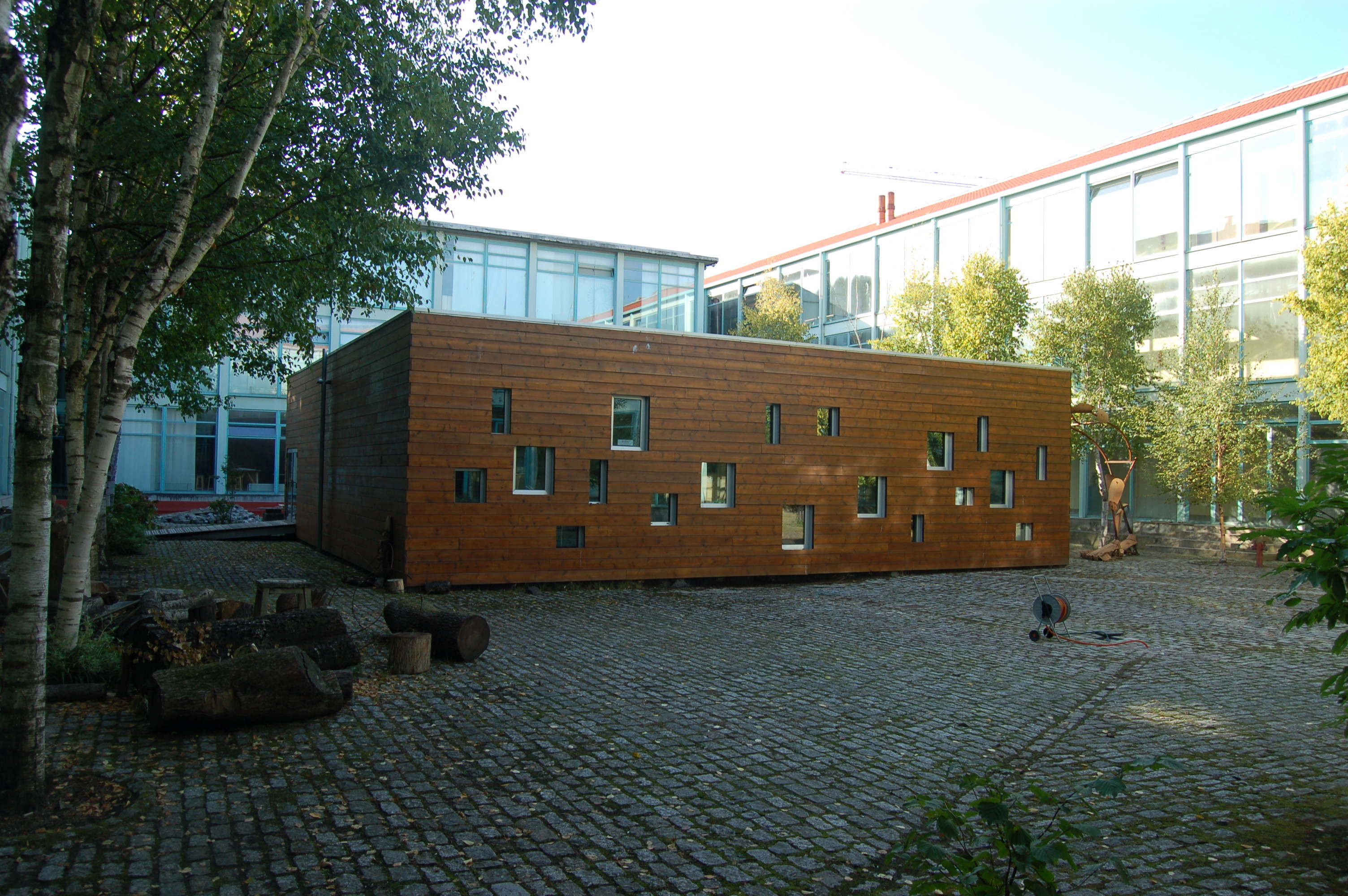 Patio interior da facultade de Belas Artes de Pontevedra.